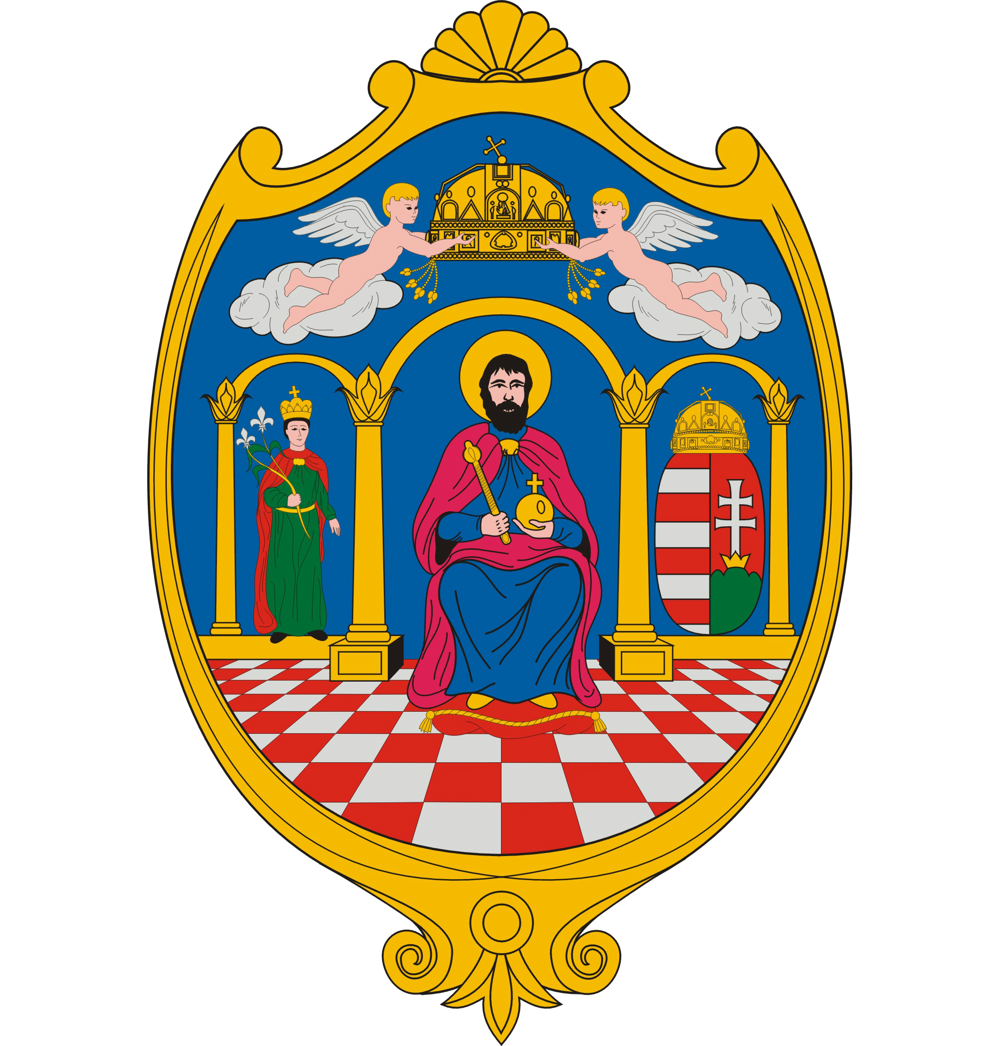 Coats of arm of countie of Hungary